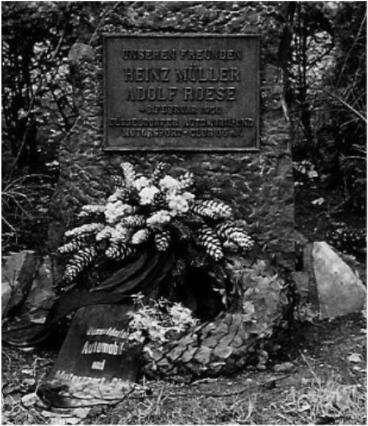 Gedenkstein an der Unglücksstelle A3 von Heinz Müller und Ralph Rosse 1950, gestiftet vom DAMC 05